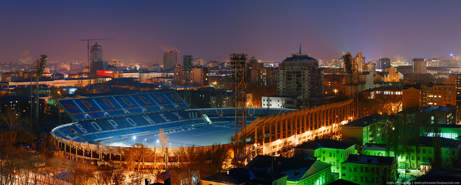 Центральный стадион профсоюзов «Труд» в Воронеже